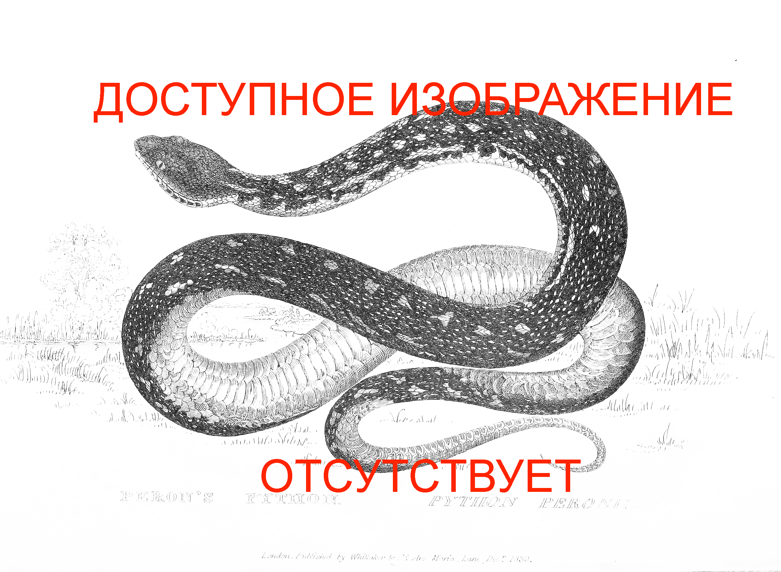 Заполнитель отсутствующих изображений змей